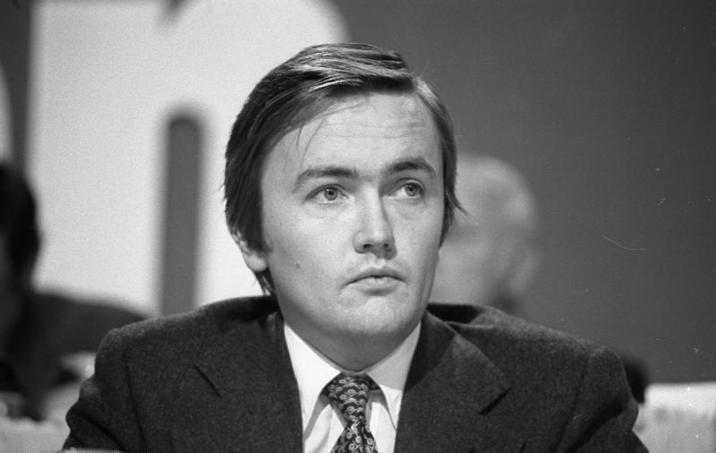 FDP-Bundesparteitag 1975 in der Rheingoldhalle, Mainz (Andreas von Schoeler)